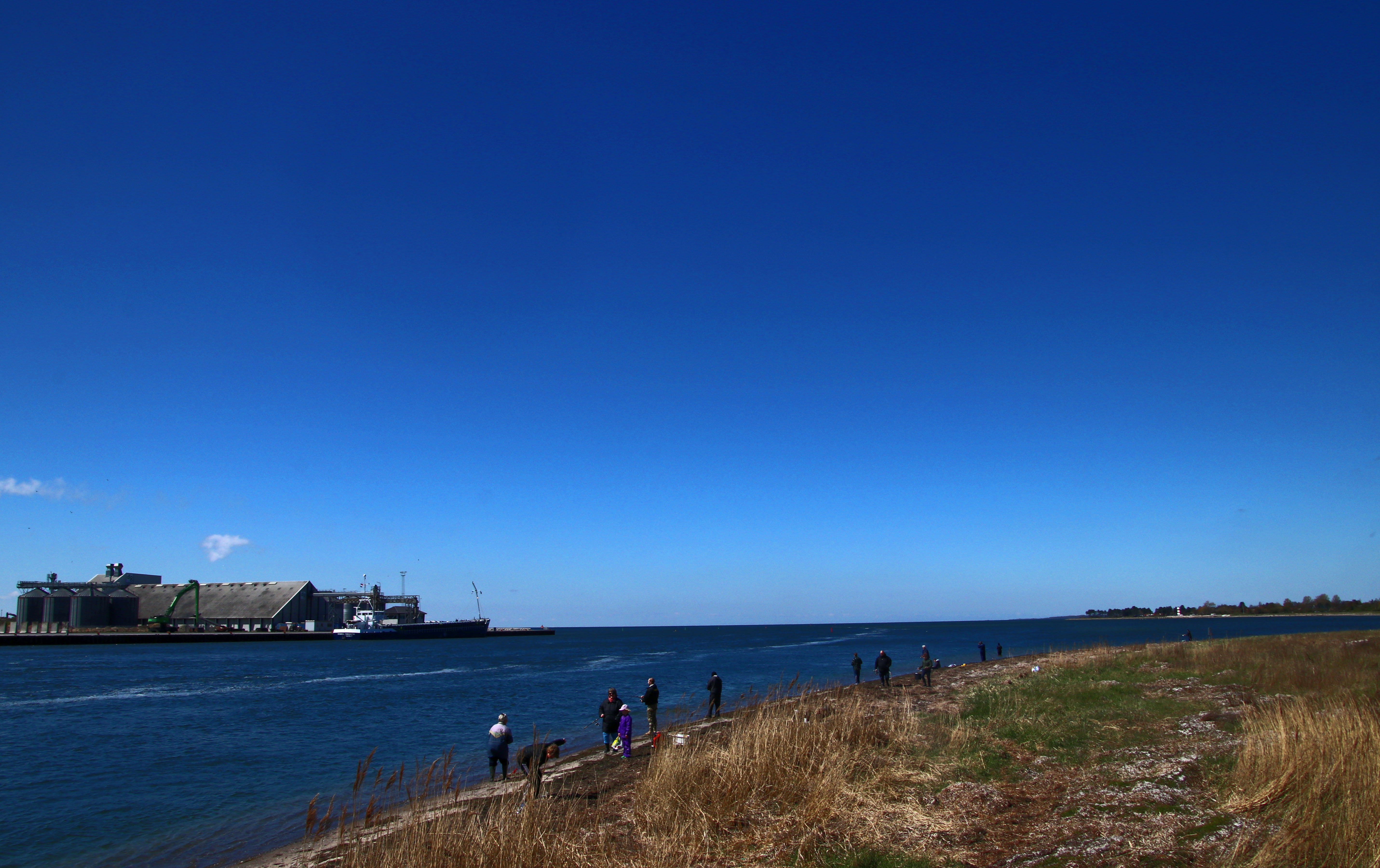 Vordingborg. Ved Masnedsund